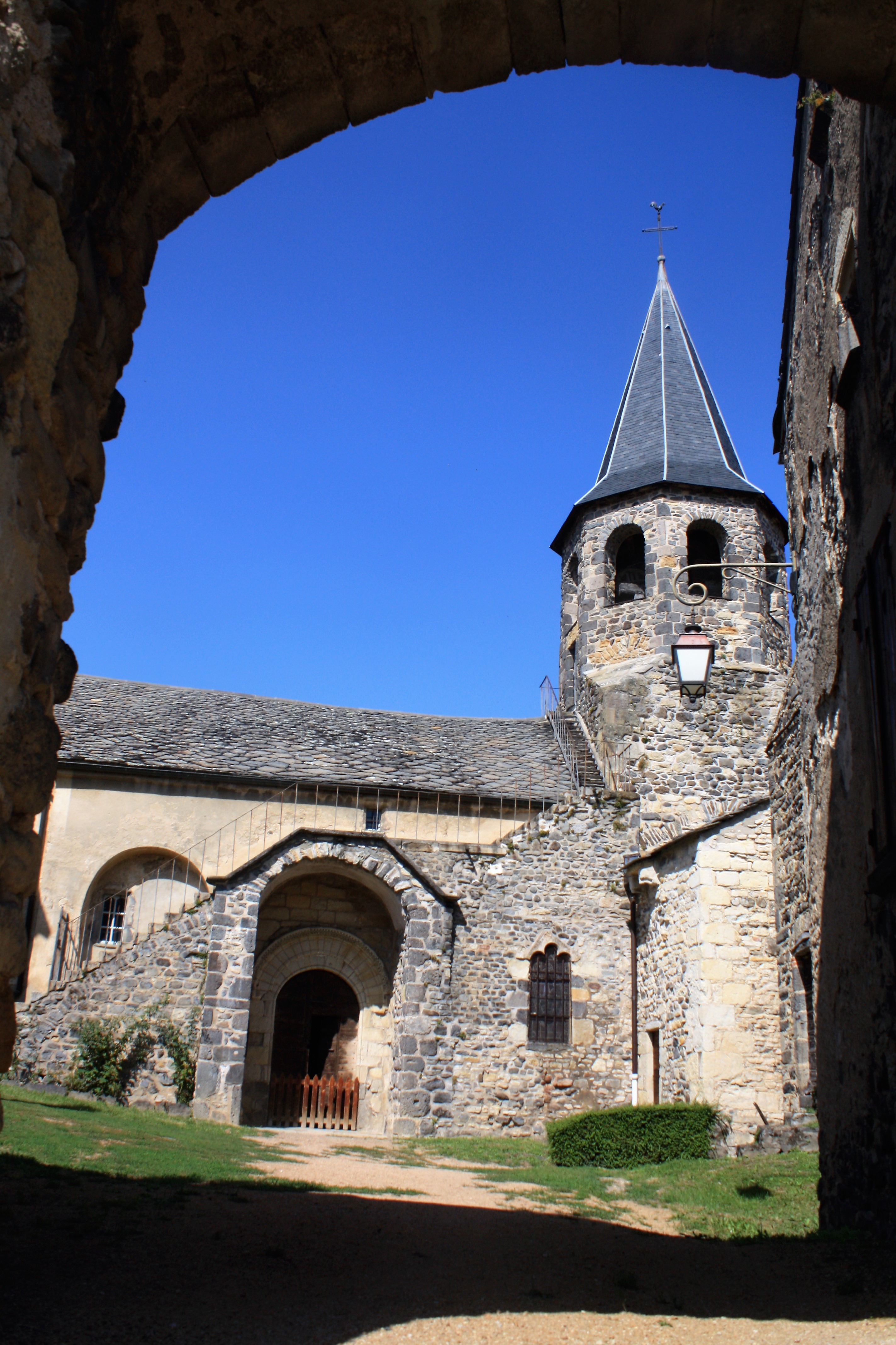 Église Sainte-Couronne de Mareugheol .